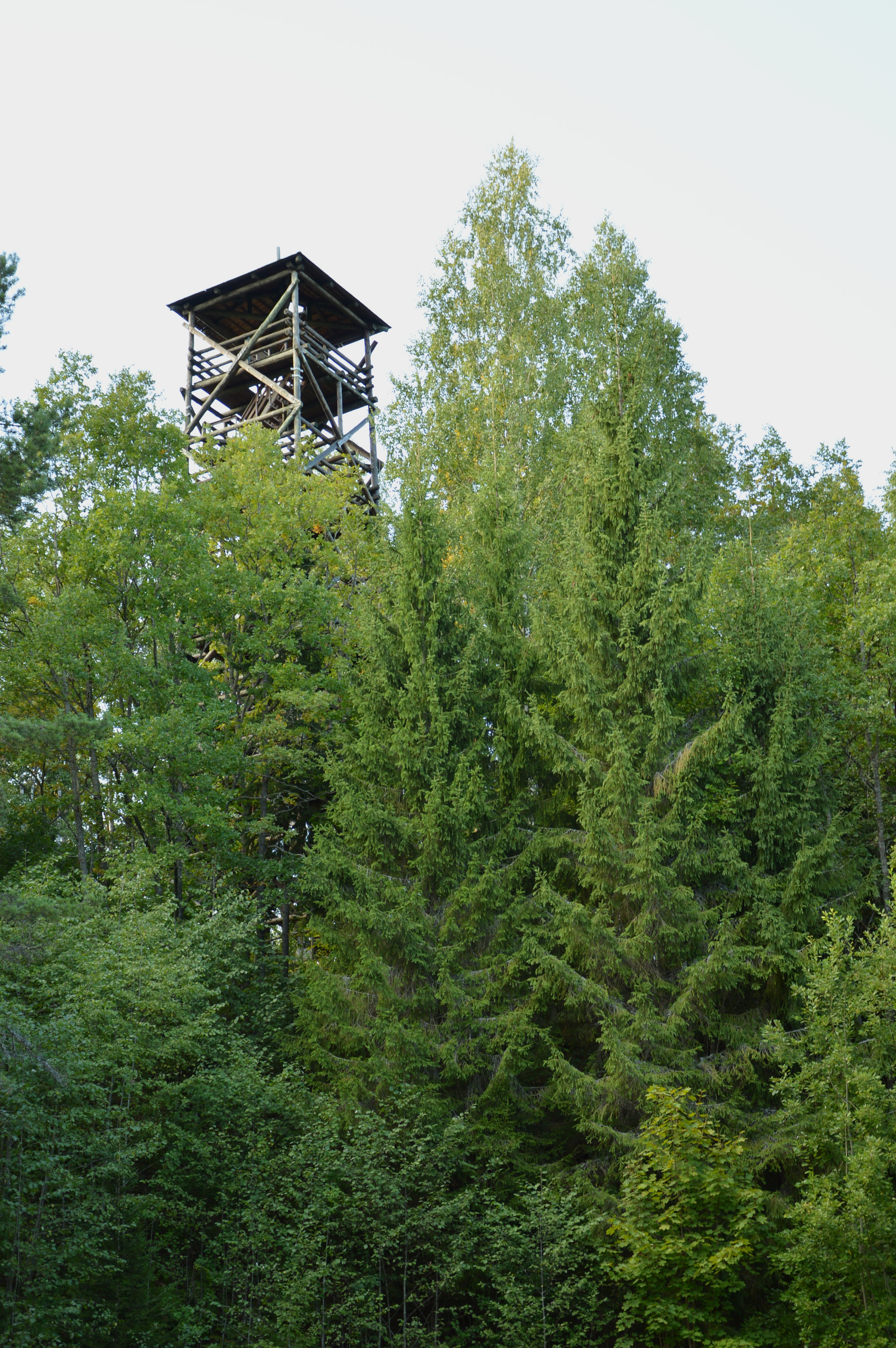 Tellingumäe vaatetorn.